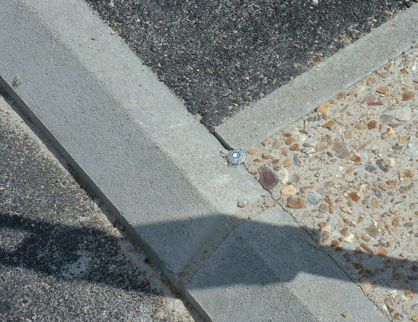 Spit